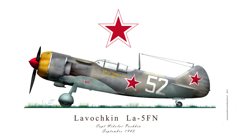 Lavochkine La-5Fn avion russe seconde guerre mondiale